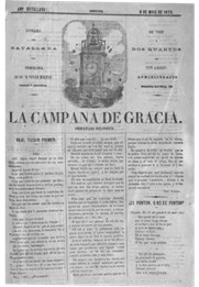 Reproducció de la portada del primer número de la publicació